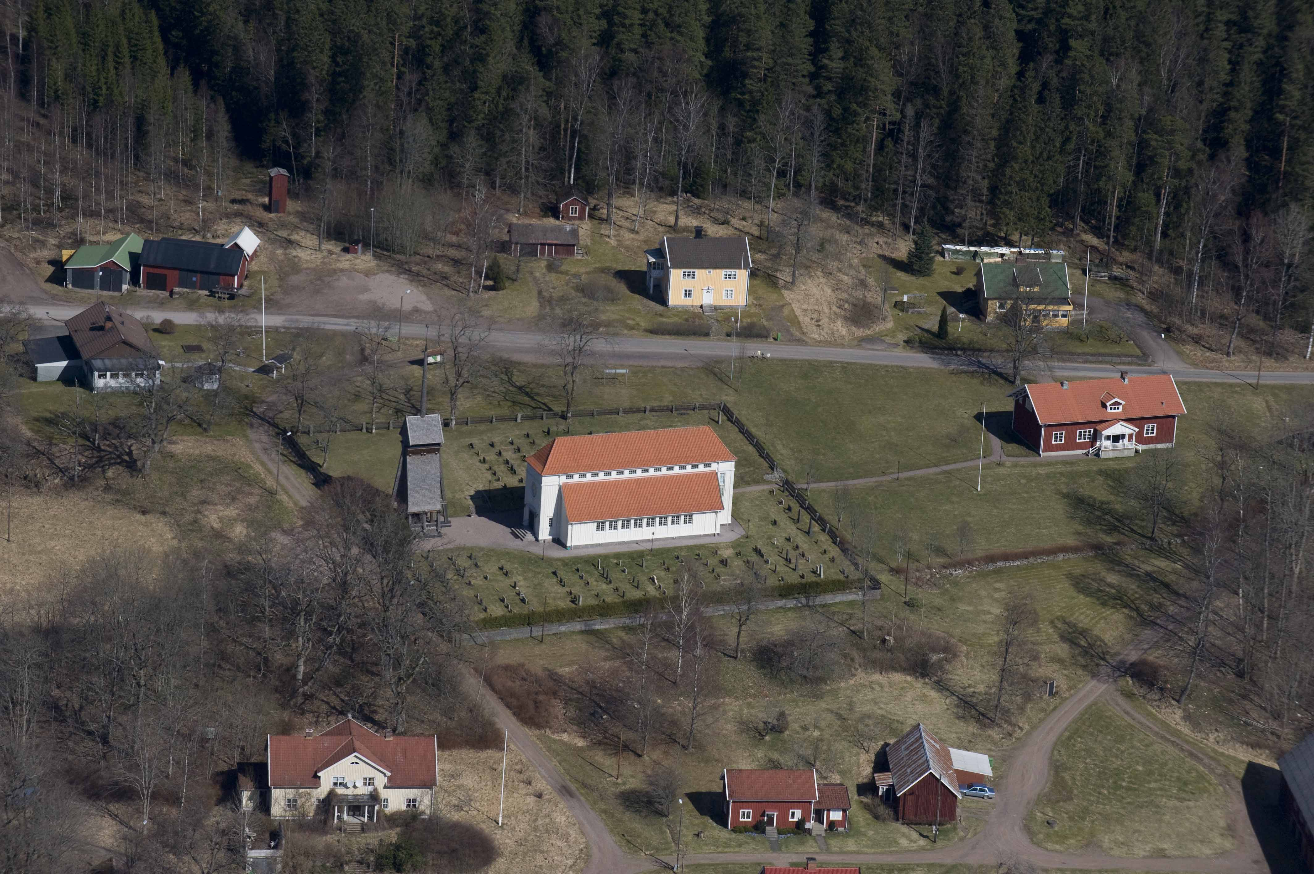 Stengårdshults kyrka från luften